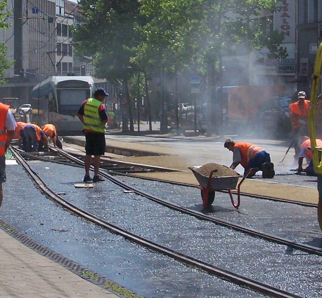 Bauarbeiten am Oberbau der Stadtbahntrasse an der Haltestelle Hauptbahnhof Saarbrücken (Feste Fahrbahn mit Asphaltausguss)